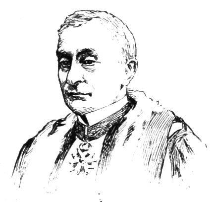 "Memento encyclopédique - Événements de Janvier 1899".